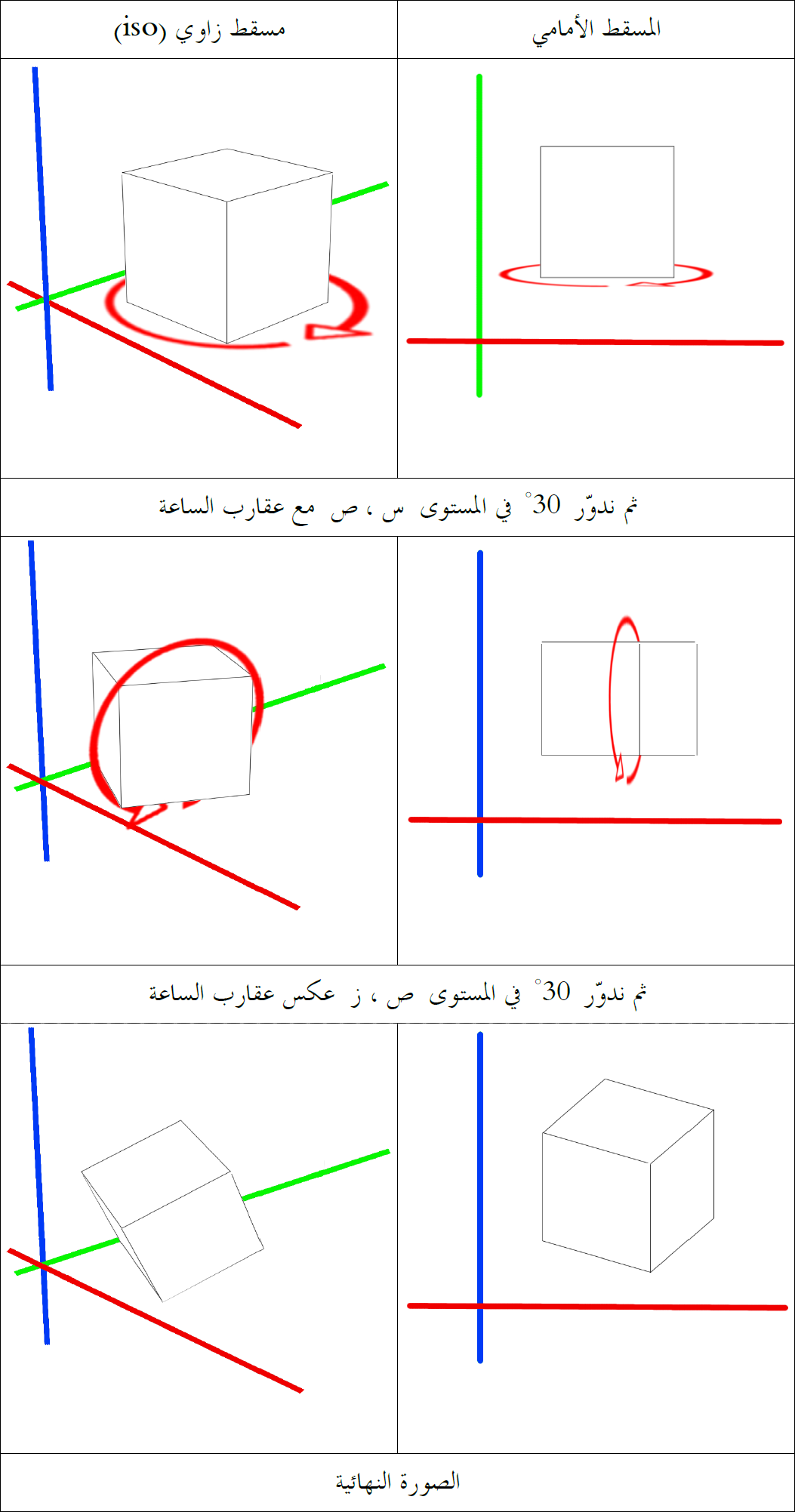 تمثيل لعملية دوران المكعب (من منظورين)